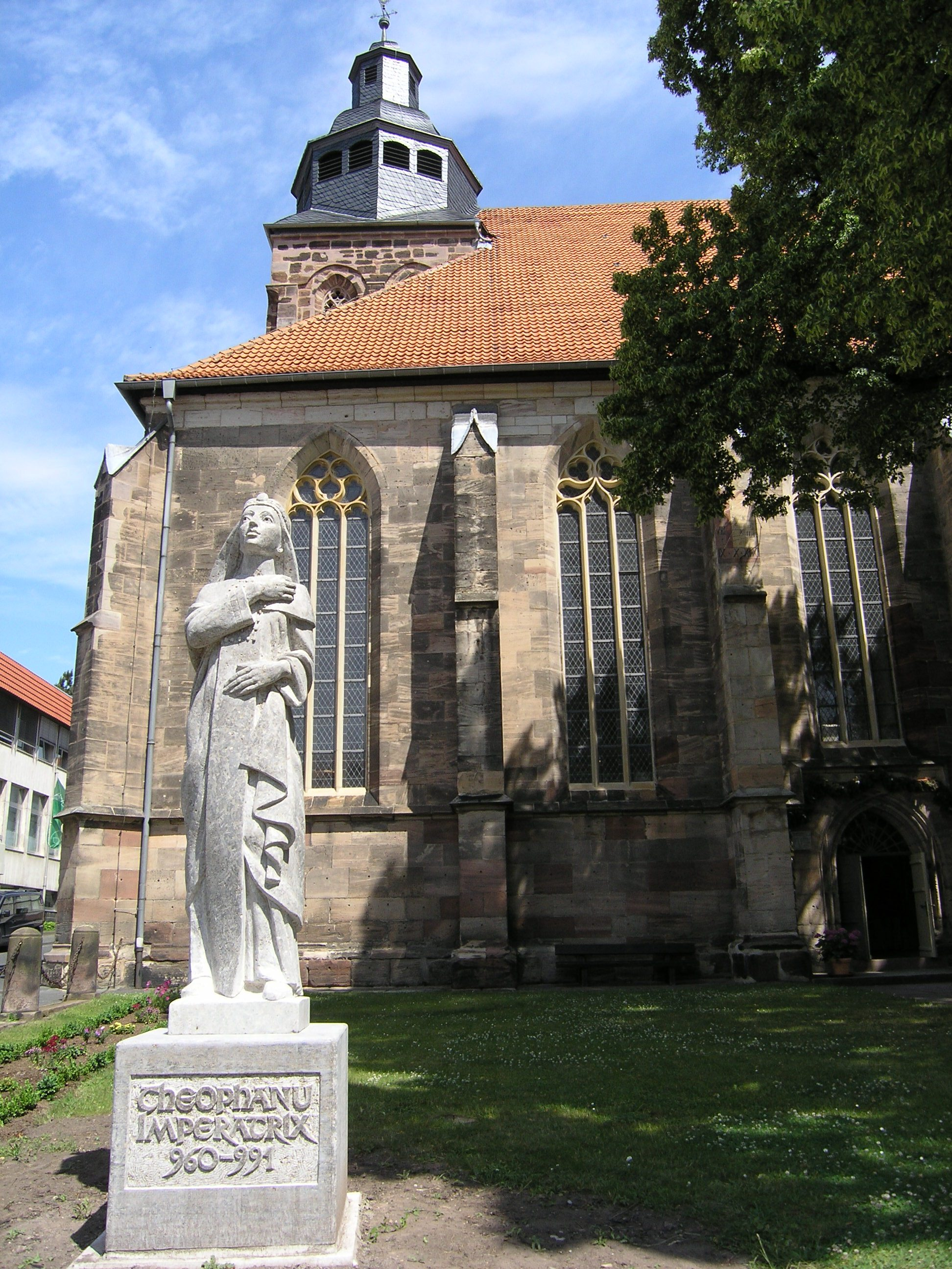 Statue der Kaiserin Theophanu vor der Marktkirche in Eschwege, Hessen, Germany